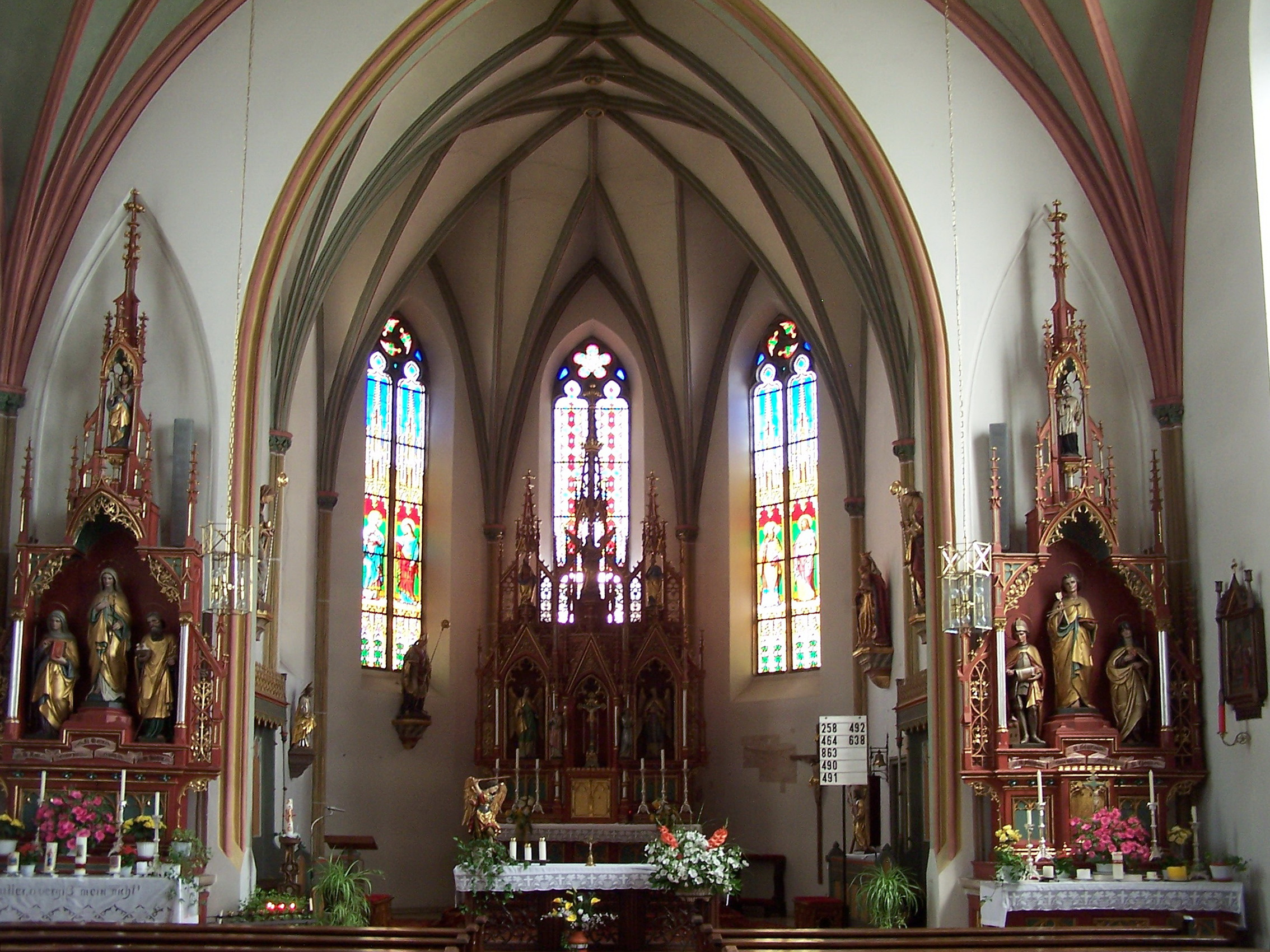 Wörth an der Donau. Hofdorf. Kath. Expositurkirche St. Michael. Altäre.